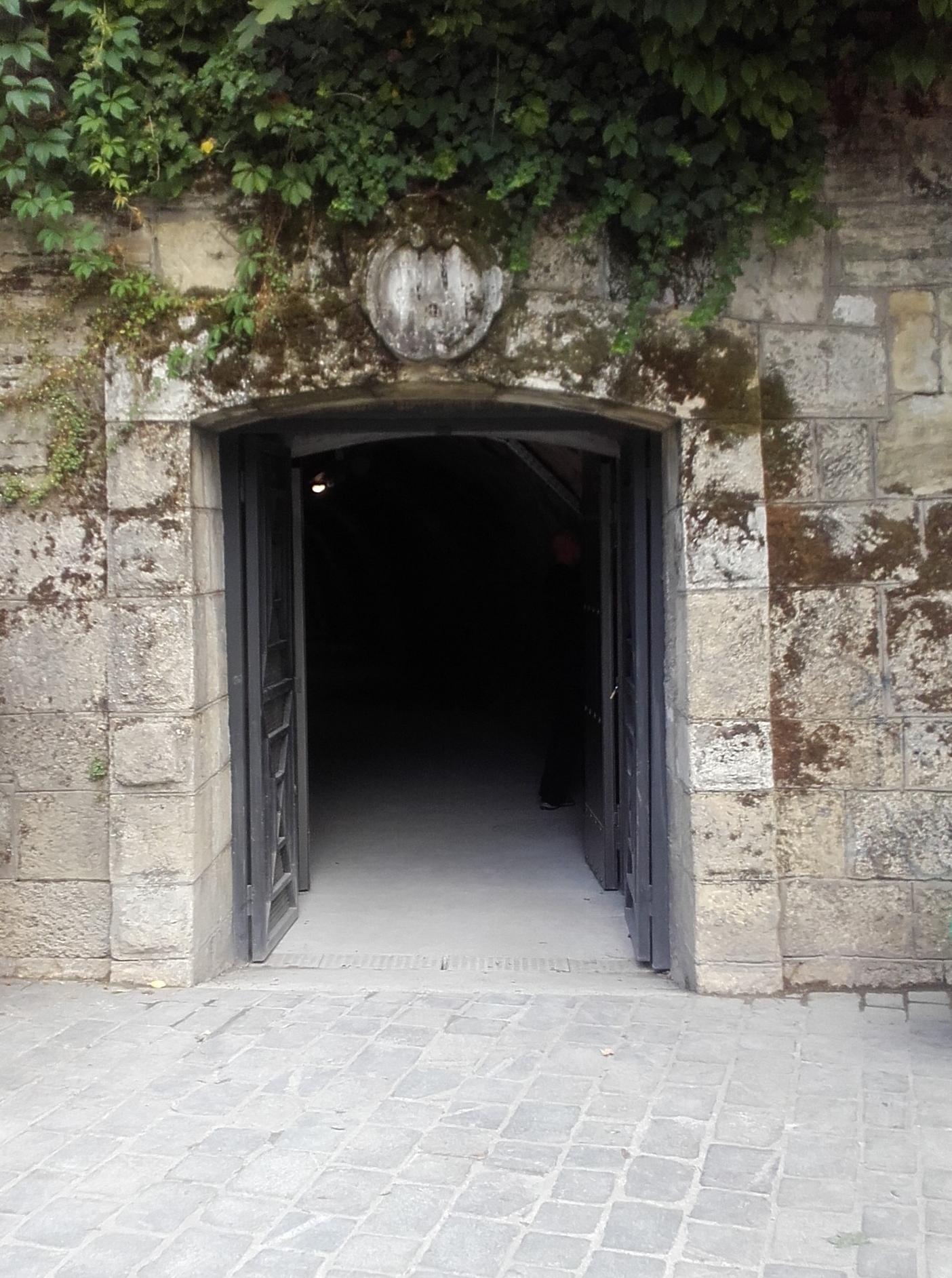 Ulaz u Tunel Grič iz Mesničke ulice